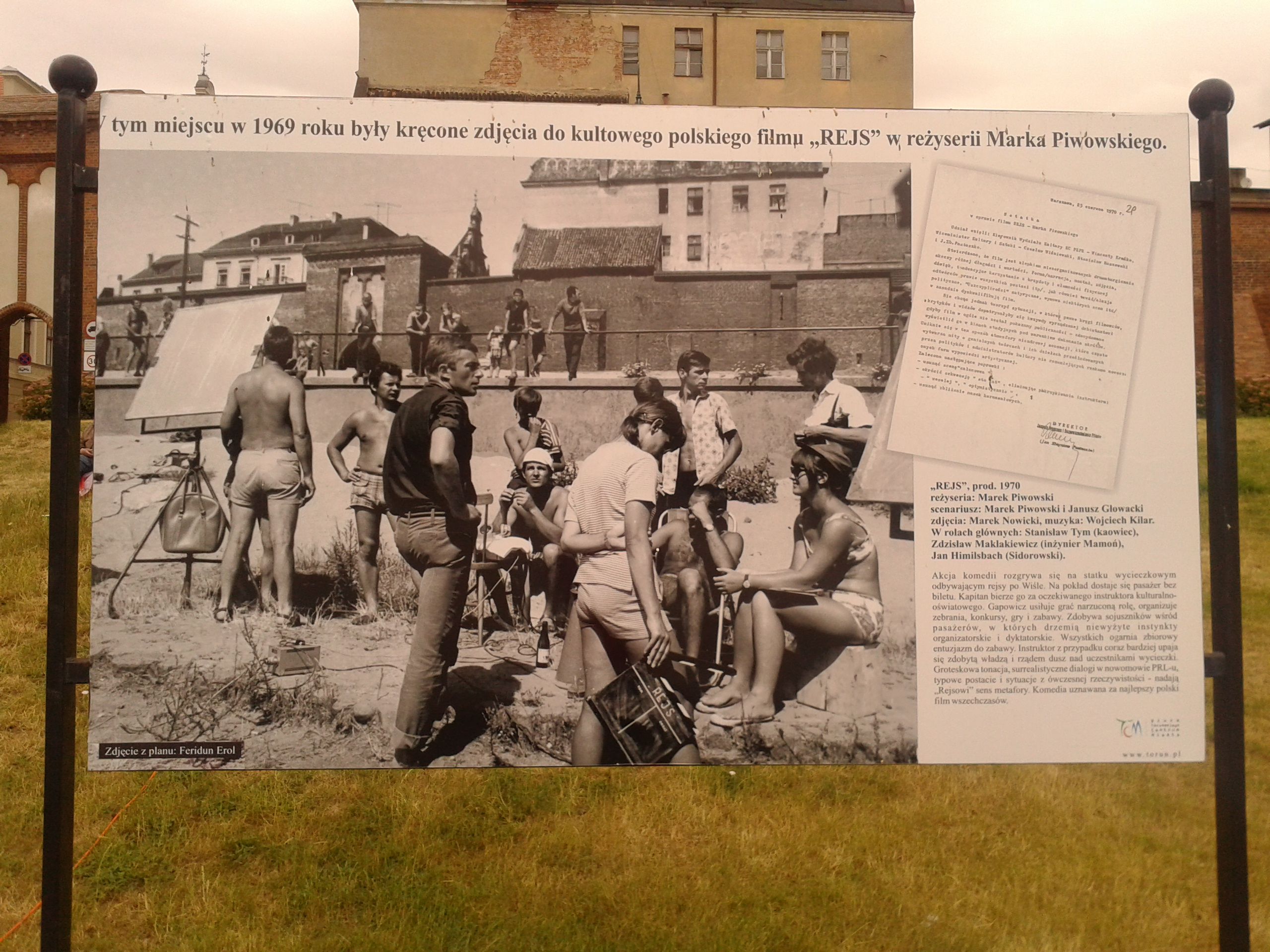 Tablica pamiątkowa filmu Rejs Marka Piwowskiego od strony Wisły - Toruń, Bulwar Filadelfijski na wyskokości ulicy Żeglarskiej